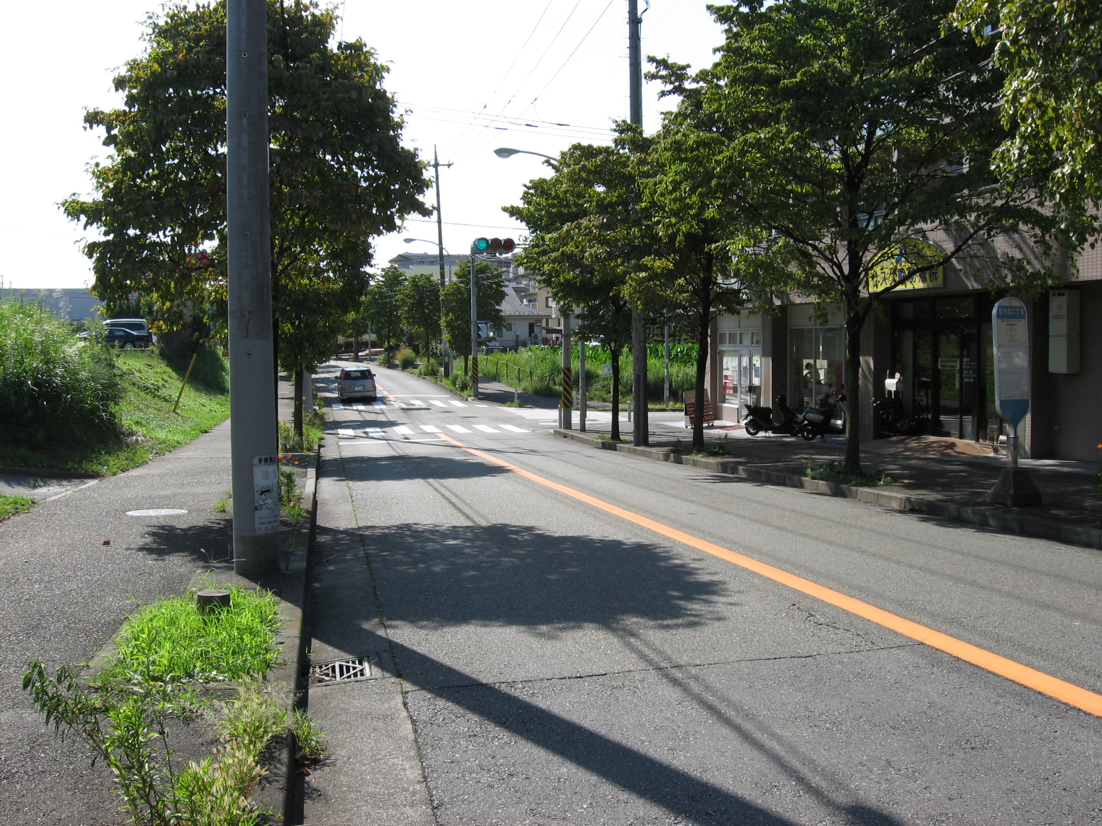 荏子田の風景